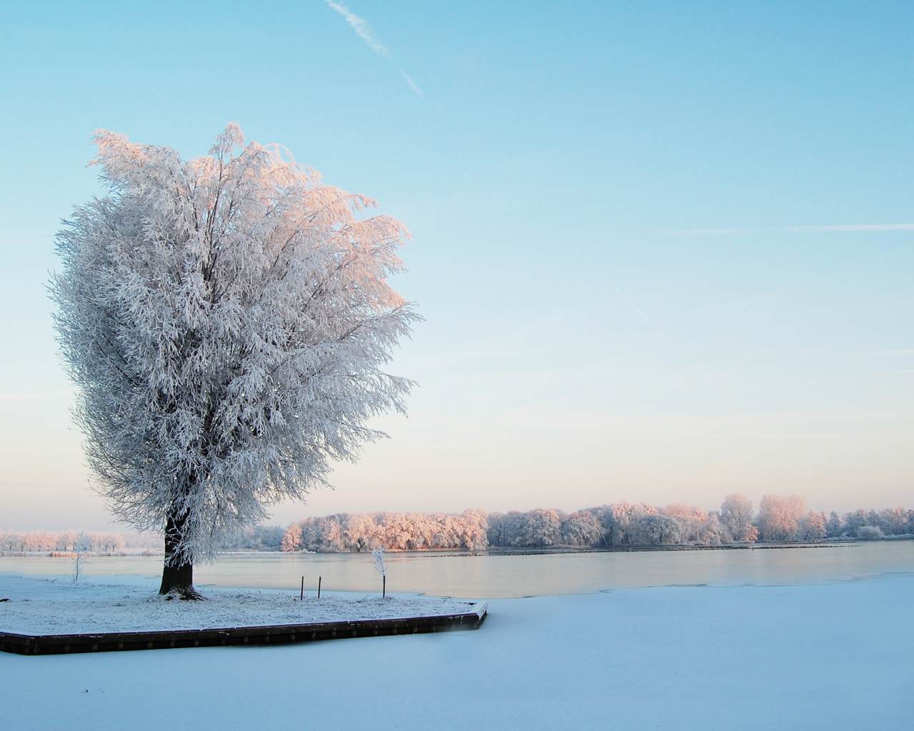 Sneeuw-Weegje